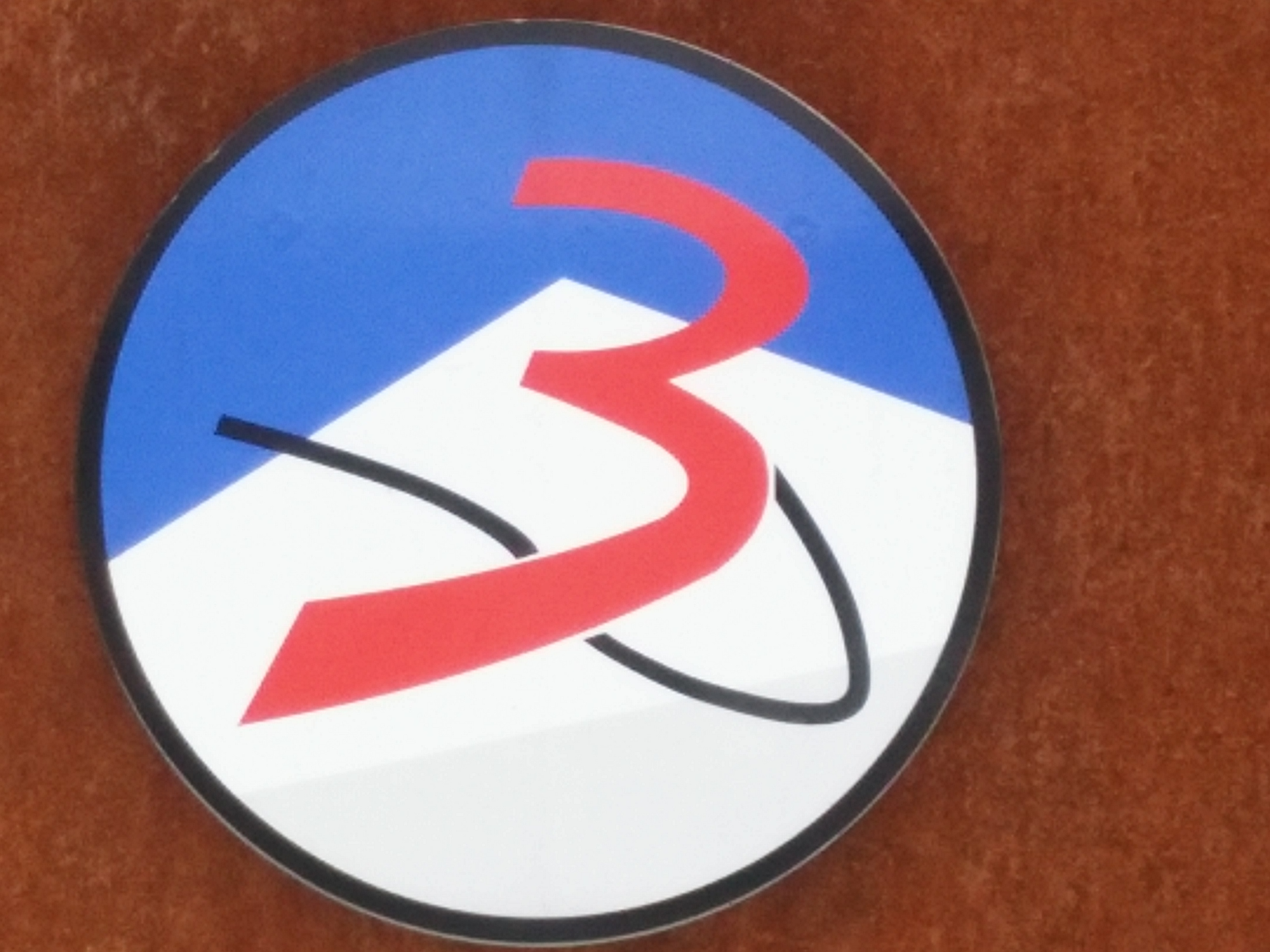 Emblem LT3